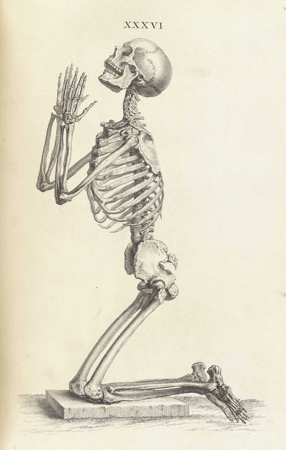 Human skeleton kneeling in prayer (plate 36).